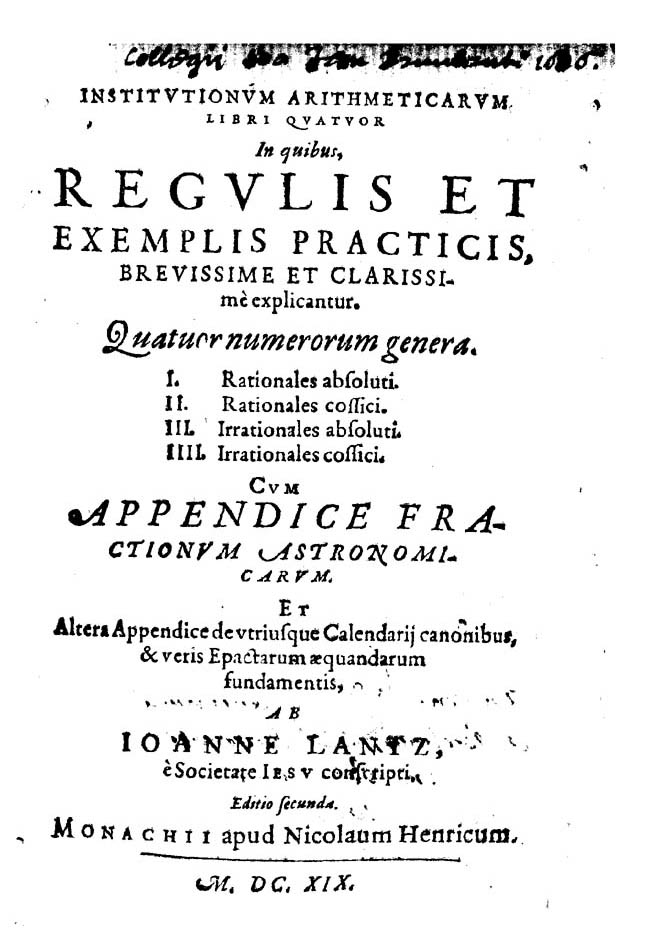 Institutionum arithmeticarum libri quatuor. In quibus, regulis et exemplis practicis, breuissime et calrissime explicantur. ... Cum appendice fractionum astronomicarum. Et indice capitum, articulorum, & rerum praecipuarum. Ab Ioanne Lantz, e Societate Iesu conscripti. - Monachii : apud Nicolaum Henricum, 1619. - [7], 207, [3] p., [1] c. di tav. ; 8º. - VD17 23:277812E. - La numerazione delle pagine inizia da c. A4v. - Una tabella ripieg. segue p. 75 .